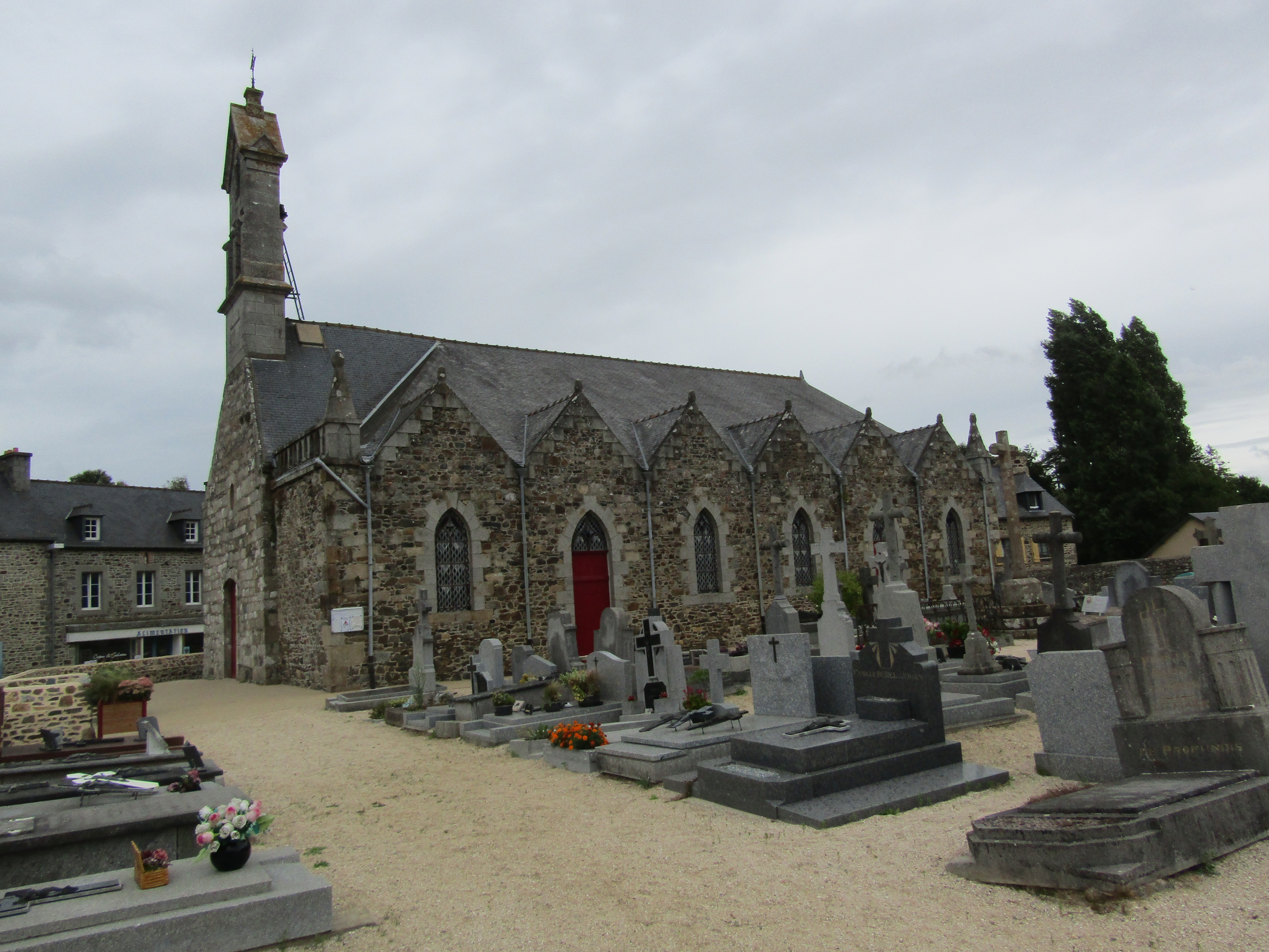 Église Saint-Gildas de Trégomeur